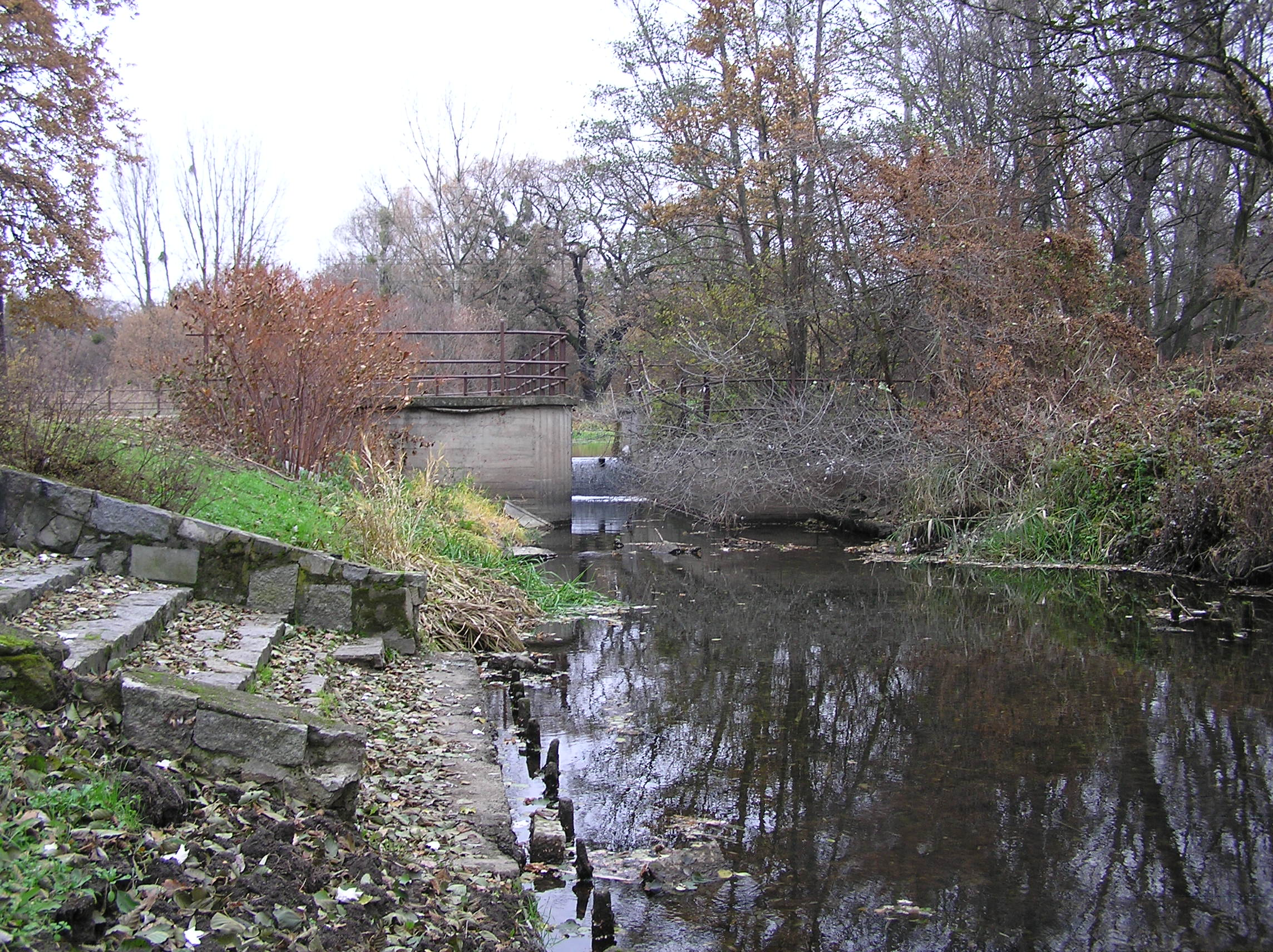 Wrocław, Park Wschodni, rozwidlenie rzeki Oława Górna, jaz